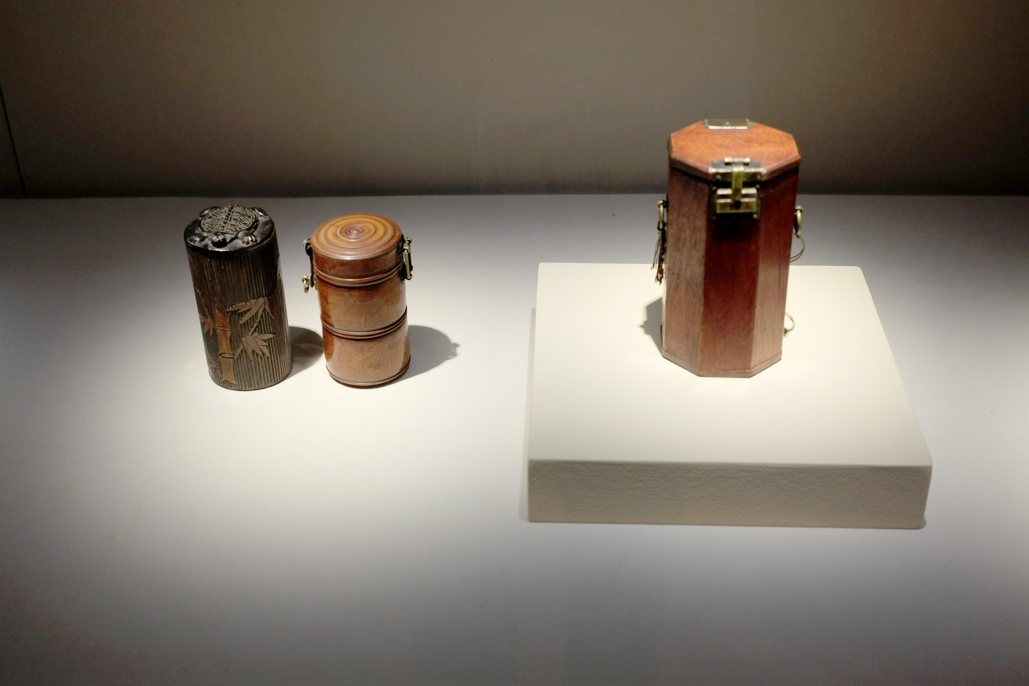 목제 망건 통, 조선, 19세기, 가래나무, 대나무, 오동나무